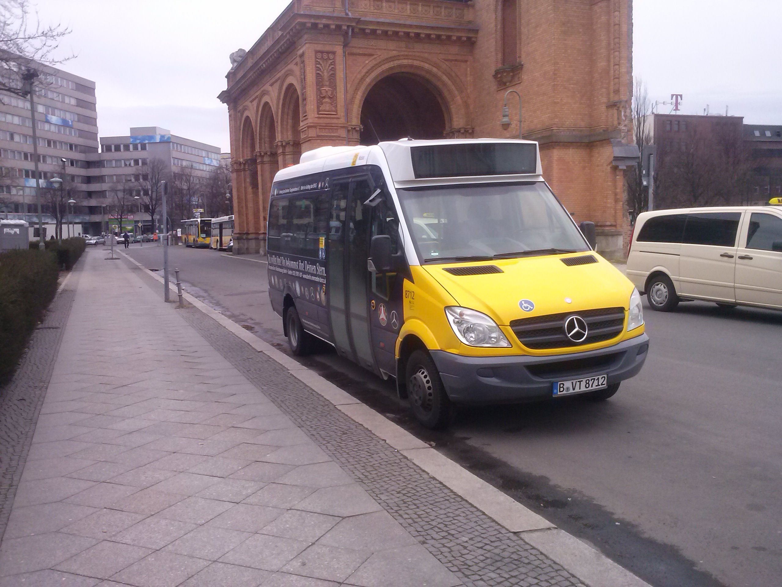 Minibus der Taxiinnung